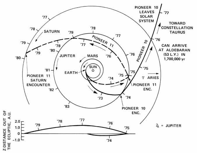 Trajectória das sondas da Pioneer Jupiter Mission. A Pioneer 10 sobrevoa Júpiter e a Pioneer 11 sobrevoa Júpiter e Saturno